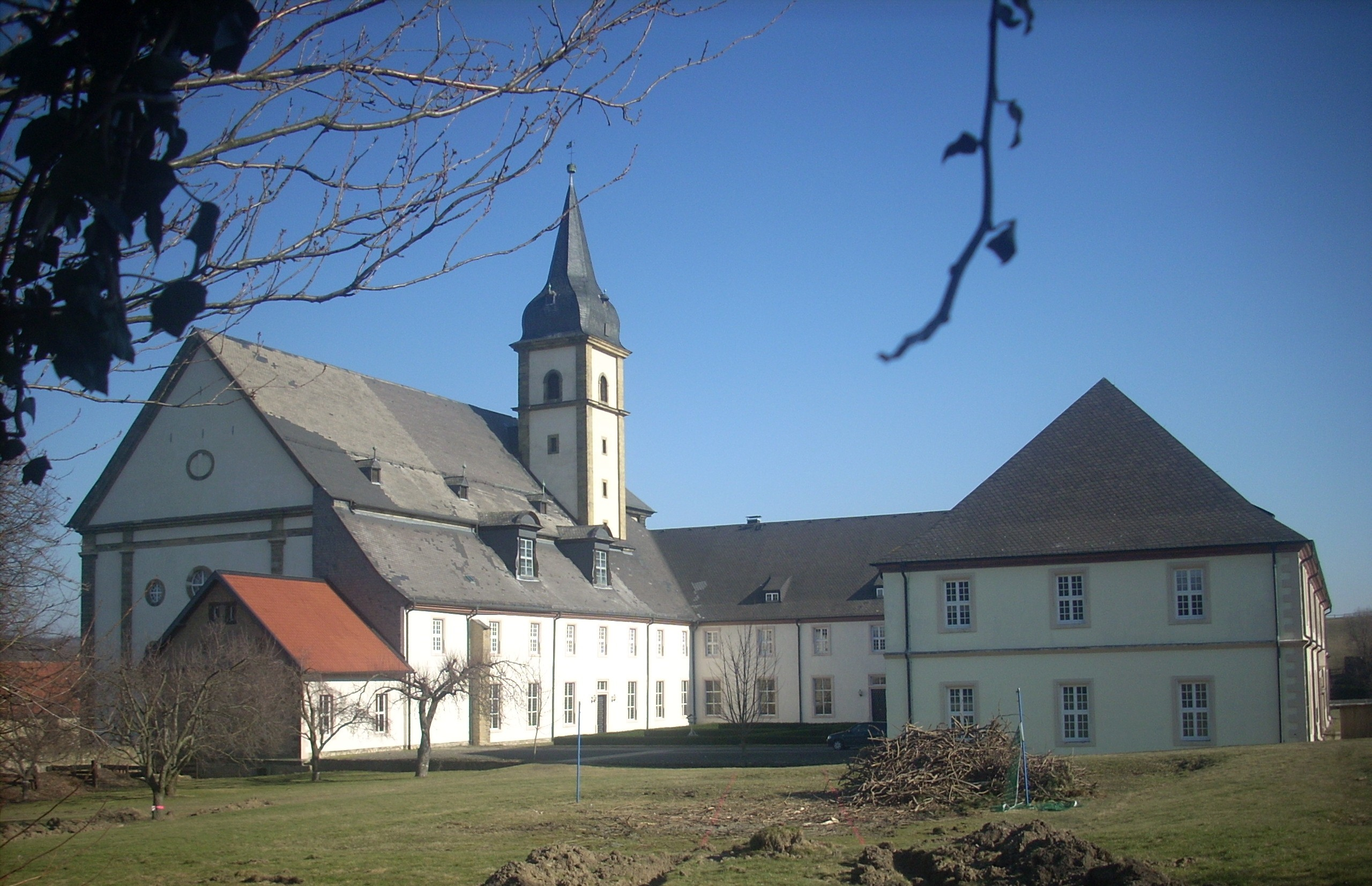 Goslar-Grauhof, ehem. Augustiner-Chorherren-Stift St. Georg von Westen